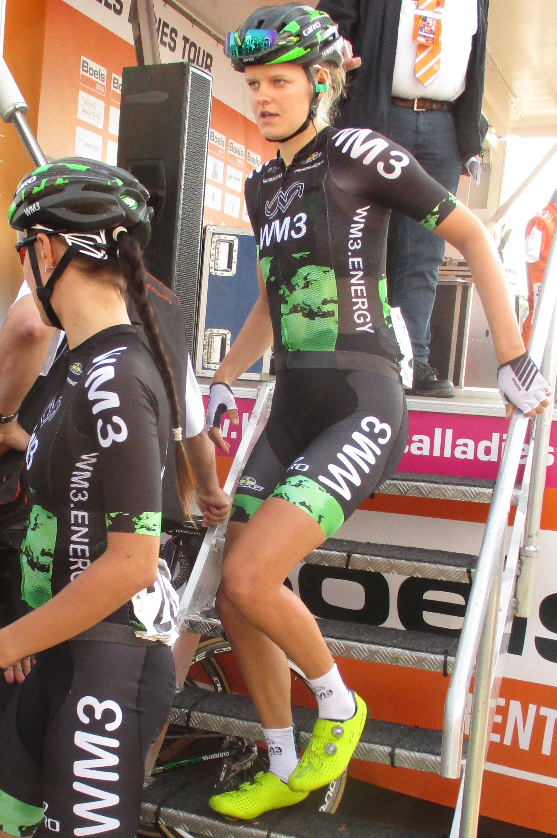 Start van de 6e etappe van de Boels Ladies Tour 2017 op het Tom Dumoulin Bike Park in Sittard-Geleen.